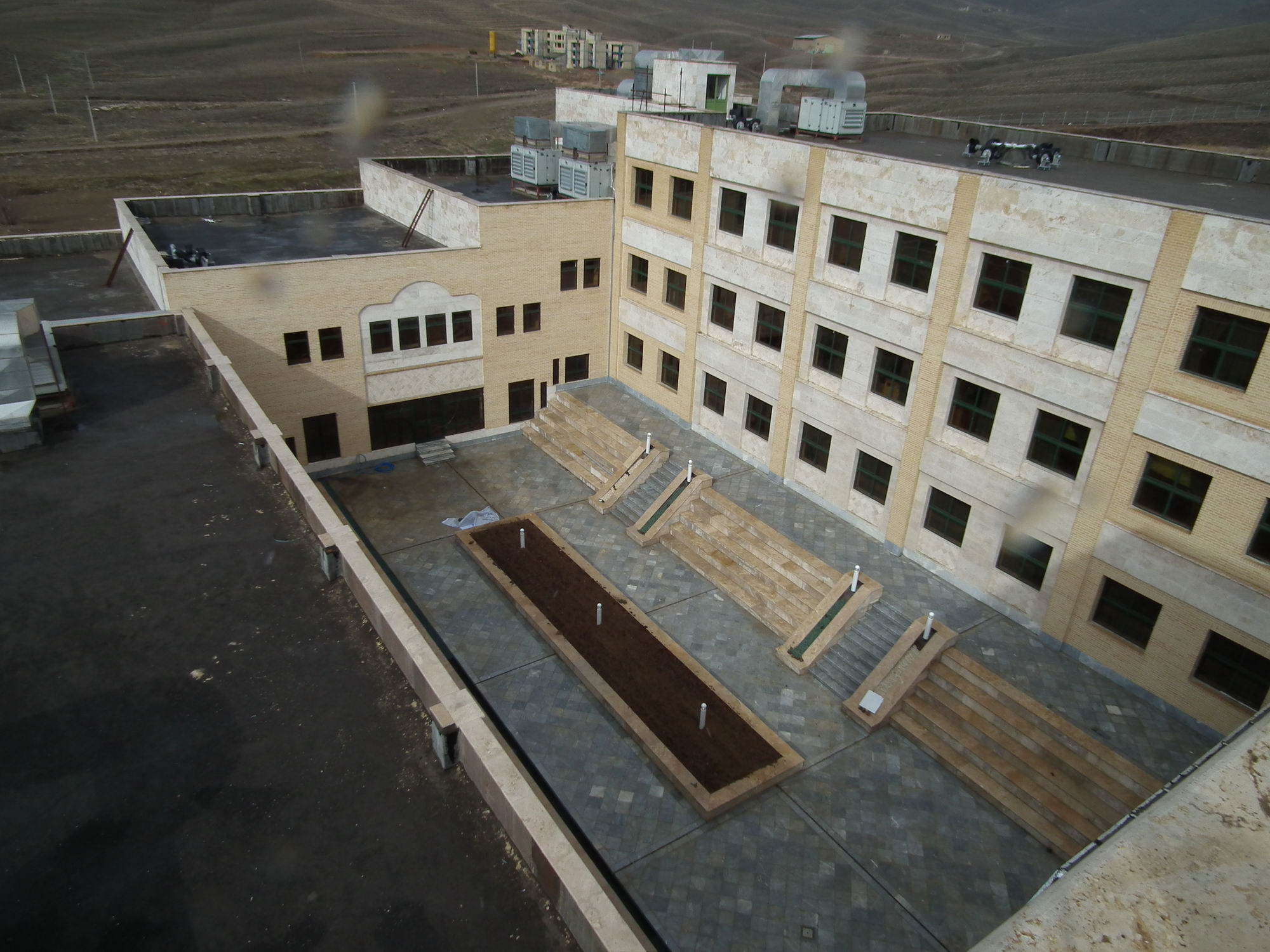 دانشکده فنی دانشگاه اراک